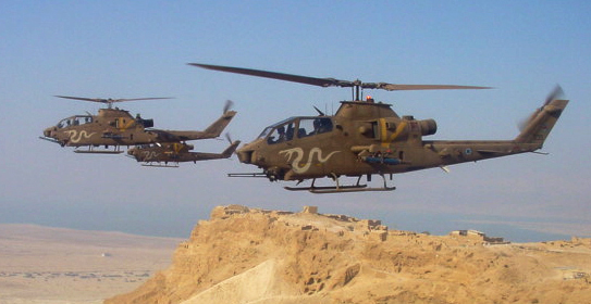 AH-1 Cobra Helicopter gunships of the IAF fly over Masada. מסוקי קוברה ("צפע") של חיל האוויר הישראלי טסים מעל מצדה.